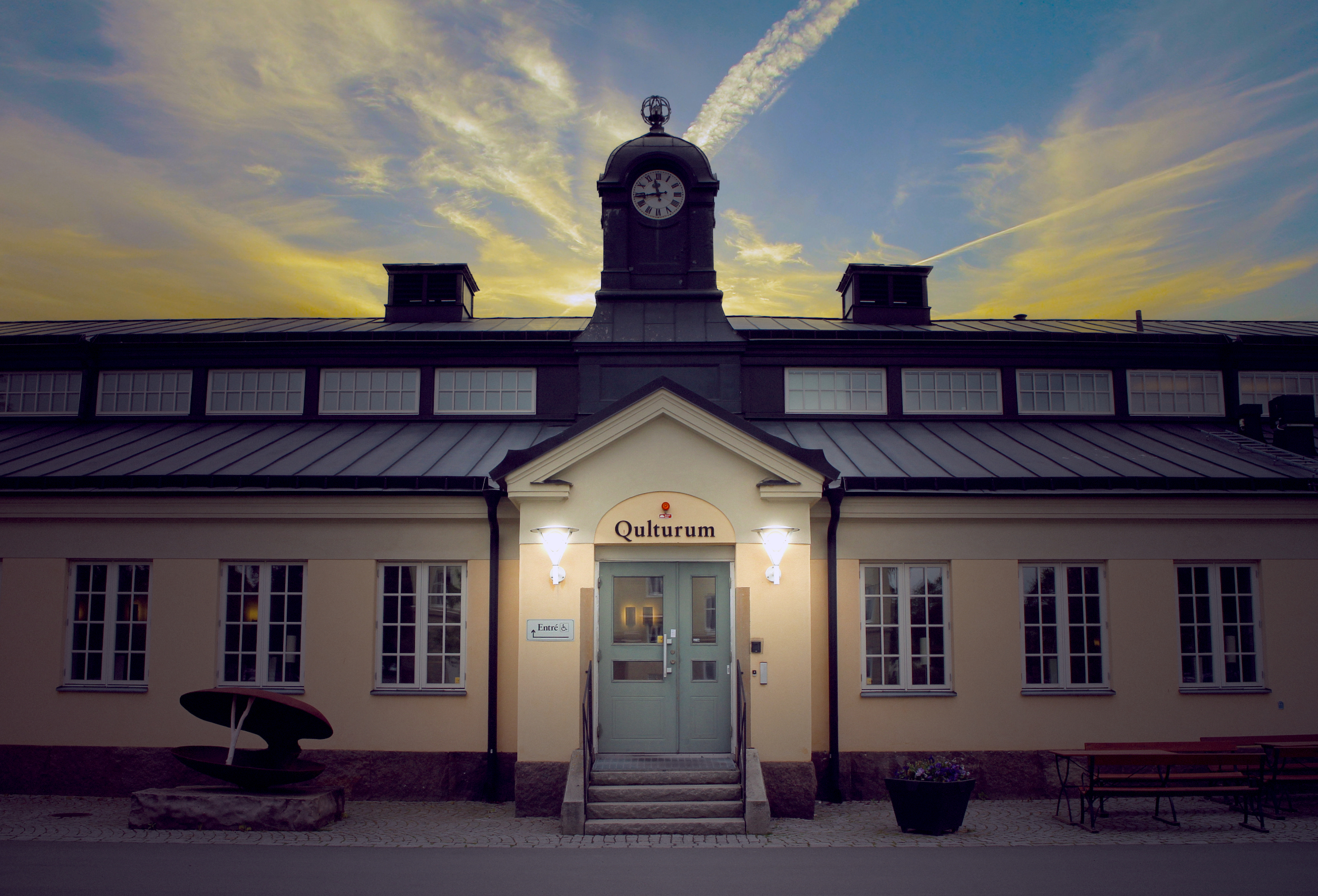 Kvällsbild av Qulturumhuset i Jönköping.